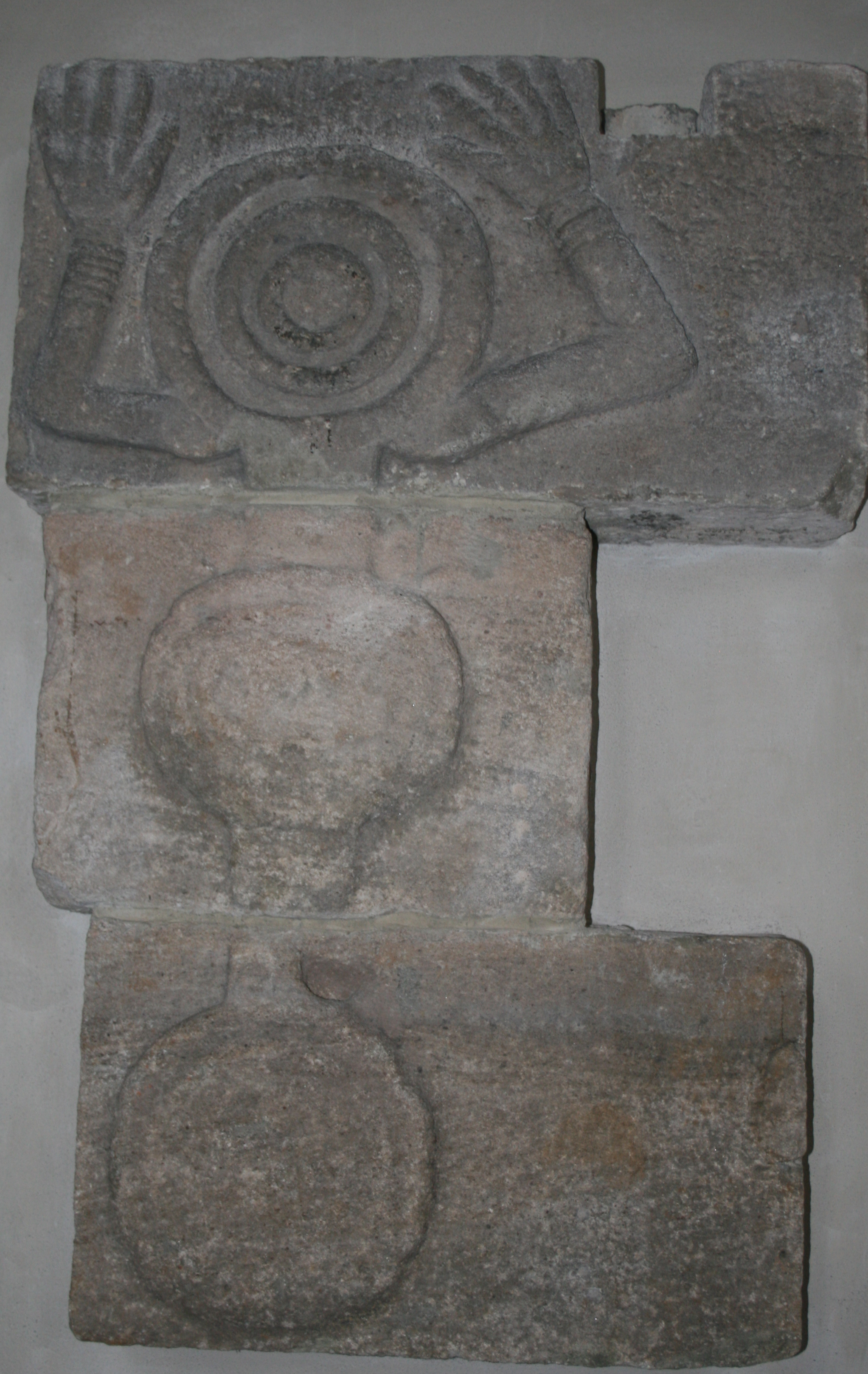 Relief aus der Jakobuskirche Tübingen, sogenannte Sonnensteine